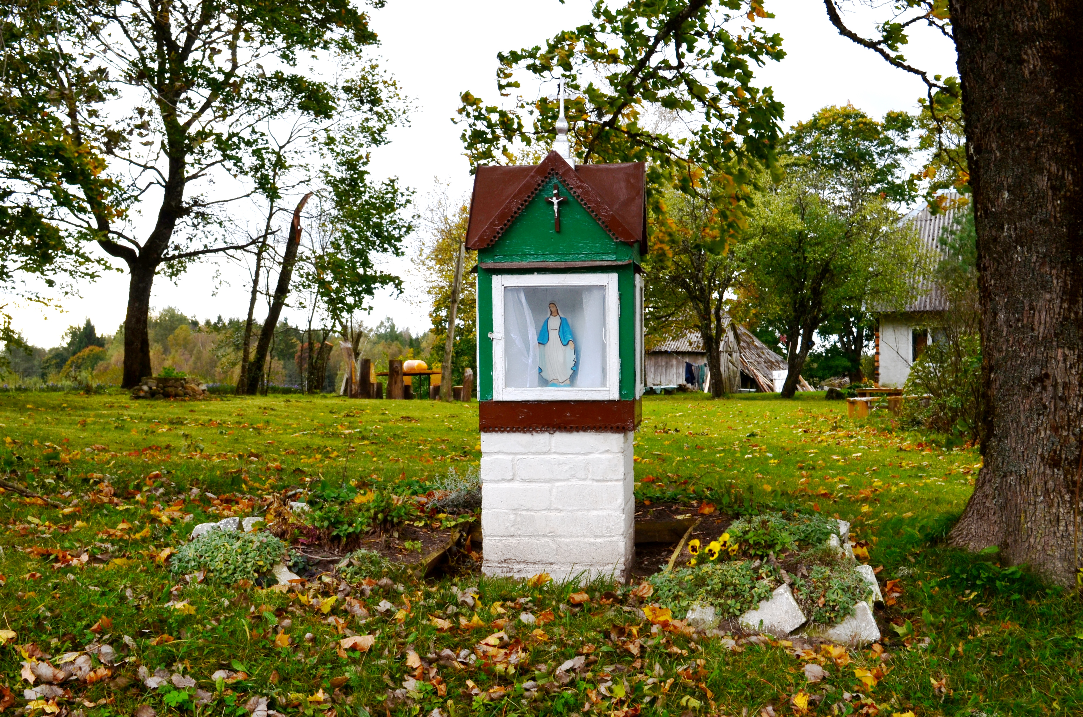 Koplytėlė Girkantiškėje, Telšių raj.